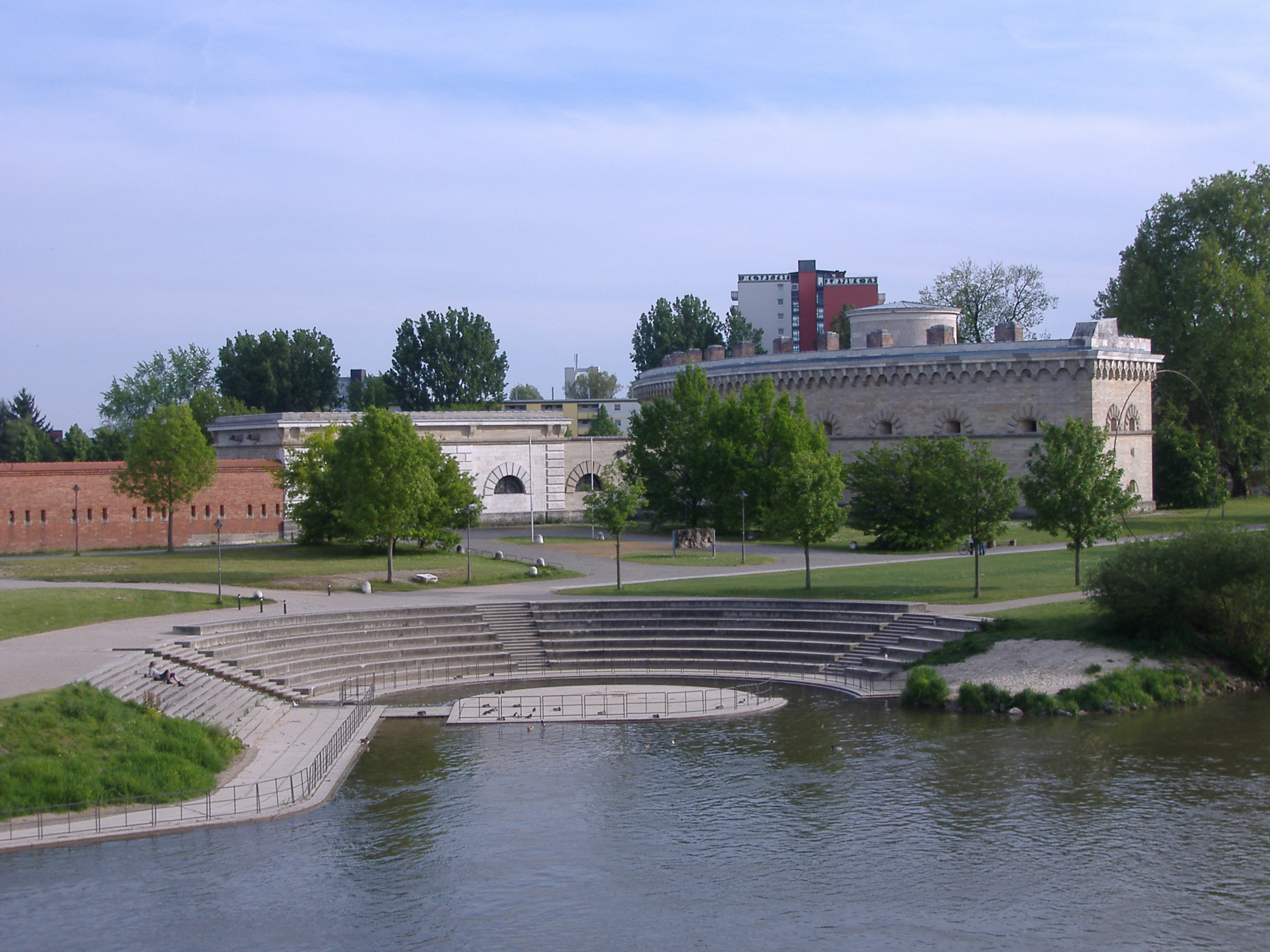 Donaubühne und Teil des Reduit Tilly